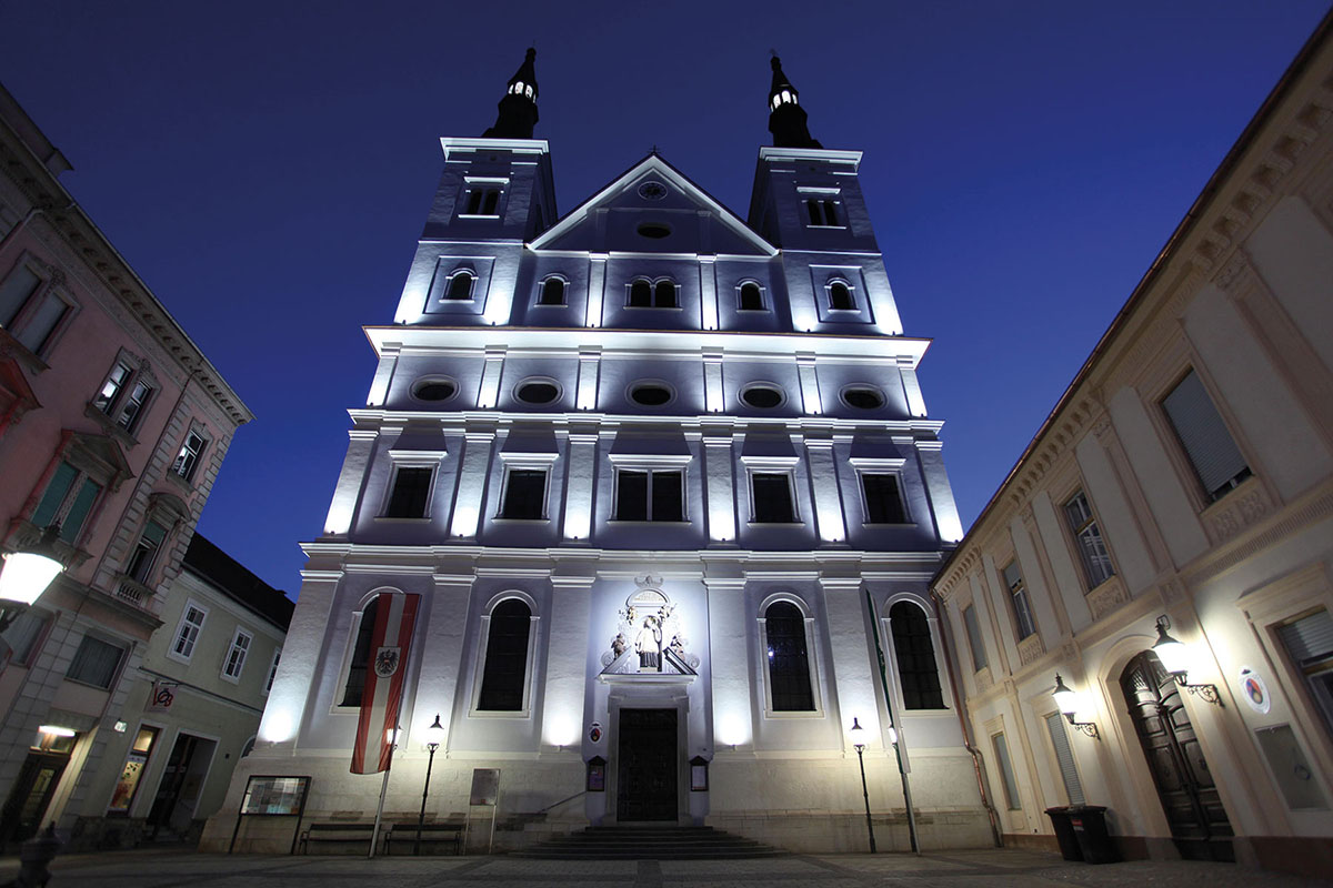 Stadtpfarrkirche St. Xaver